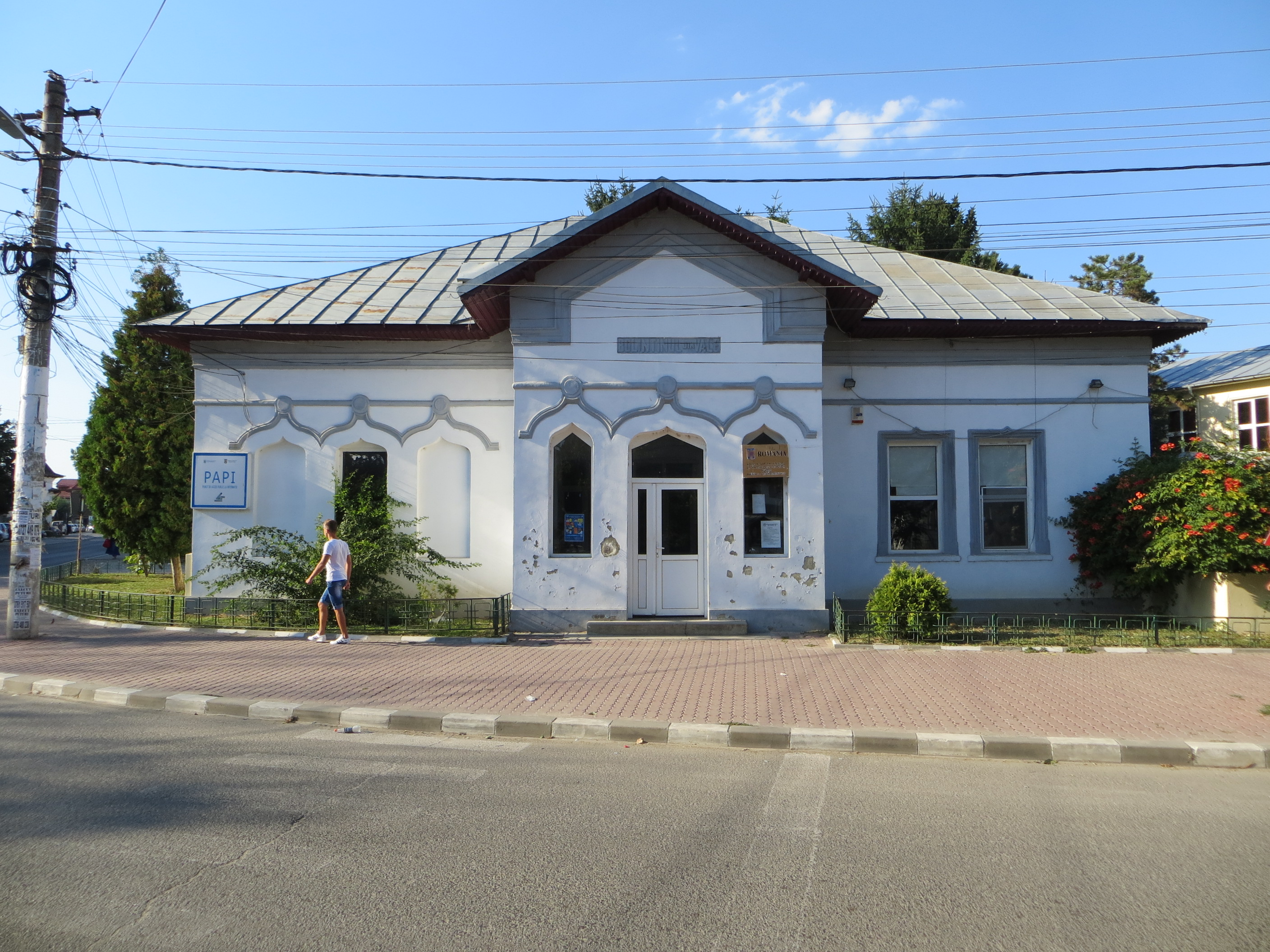 Primăria veche, azi Clubul elevilor